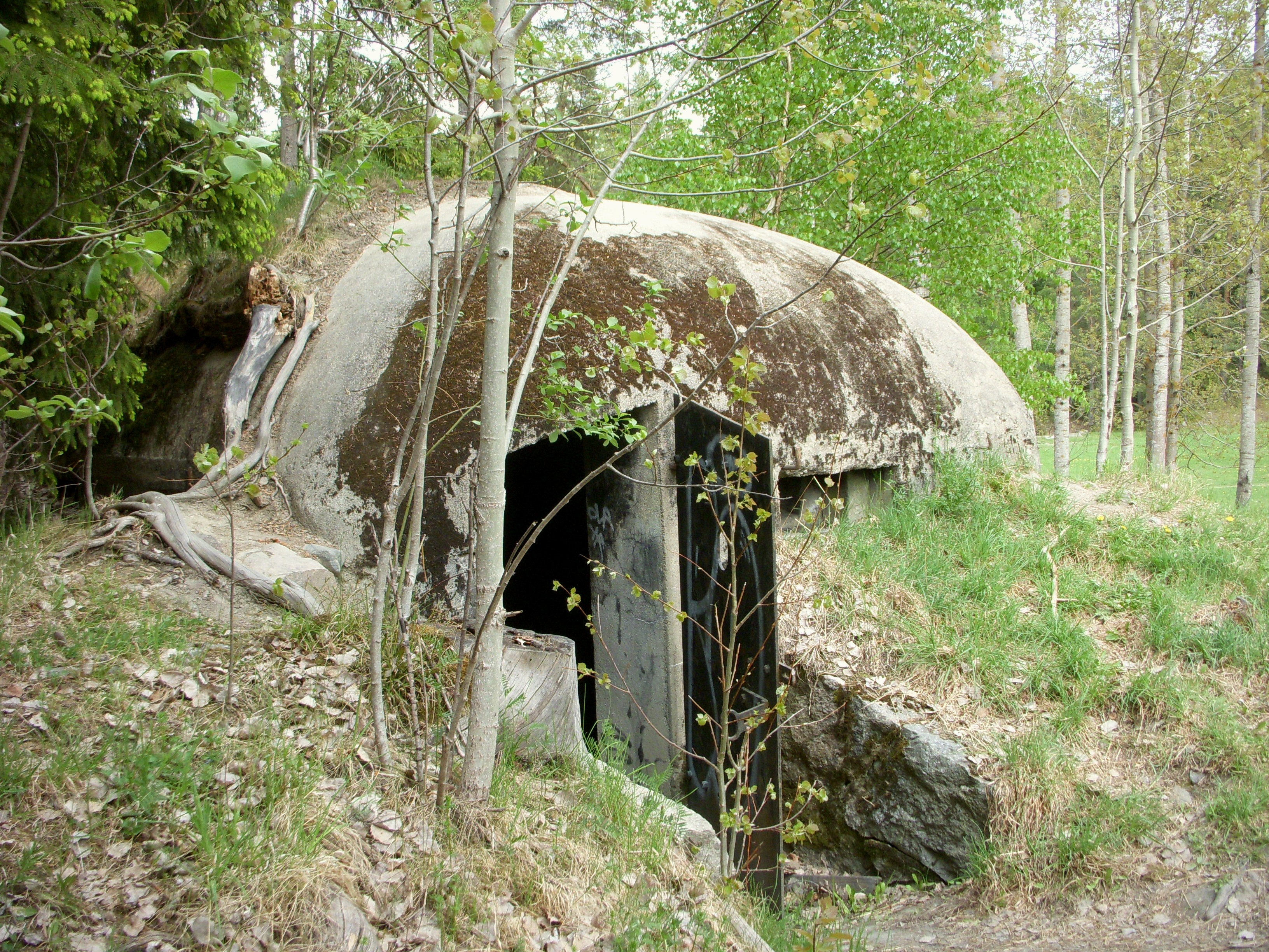 Skavlöten kulsprutebunker (västra) från första världskriget i Arninge, Täby